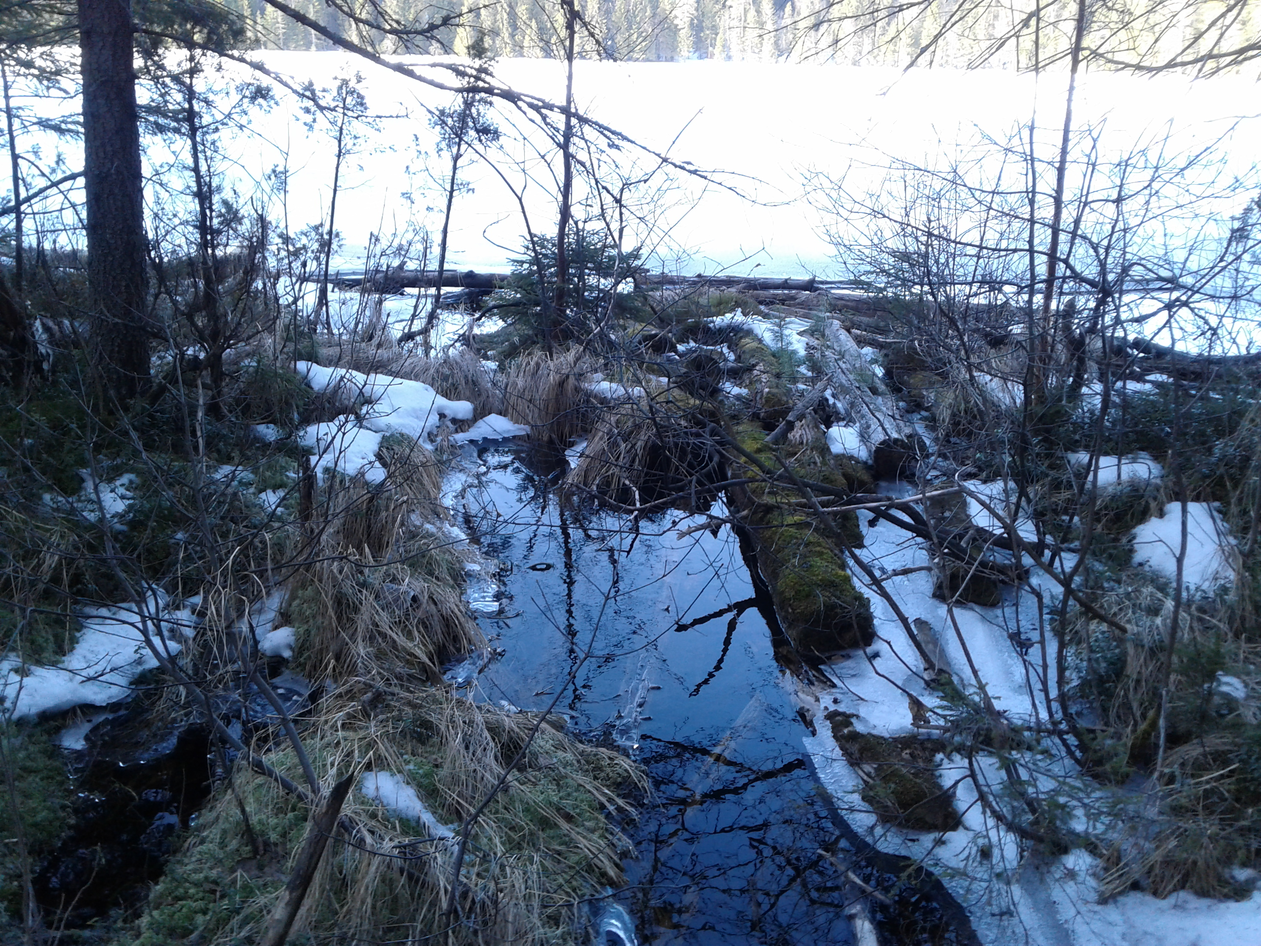 Источник реки Неглинки в Карелии